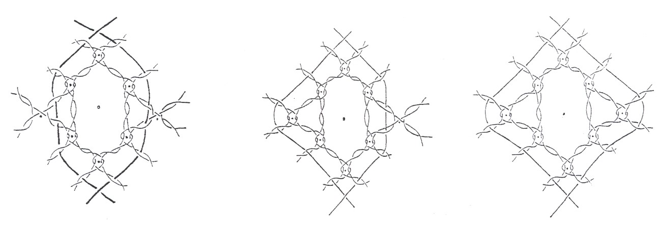 Varianty kontúrovania (opletania) očka hrubšou niťou v paličkovanom tyle.